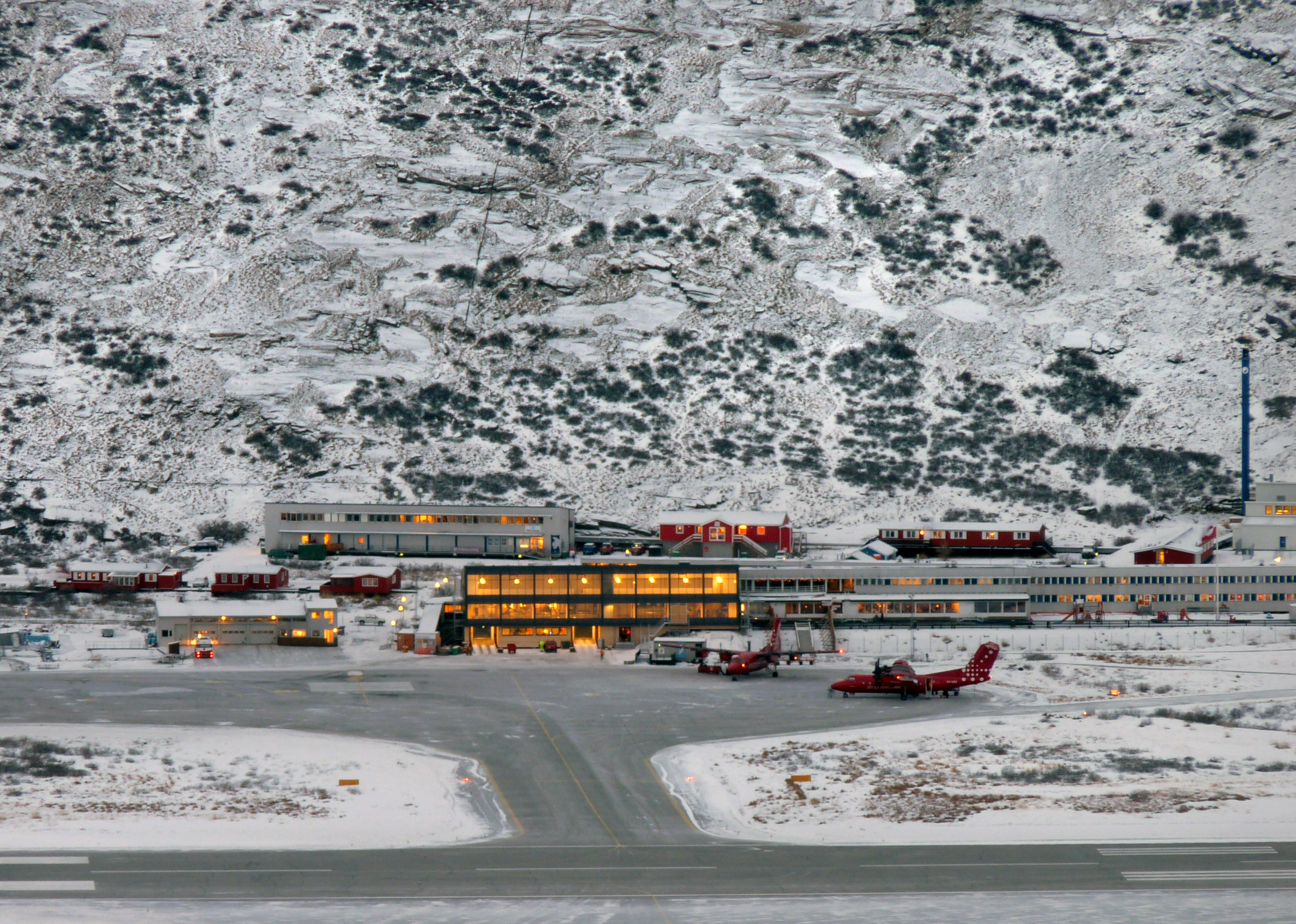 Hotel Kangerlussuaq, Airport hotel, Greenland